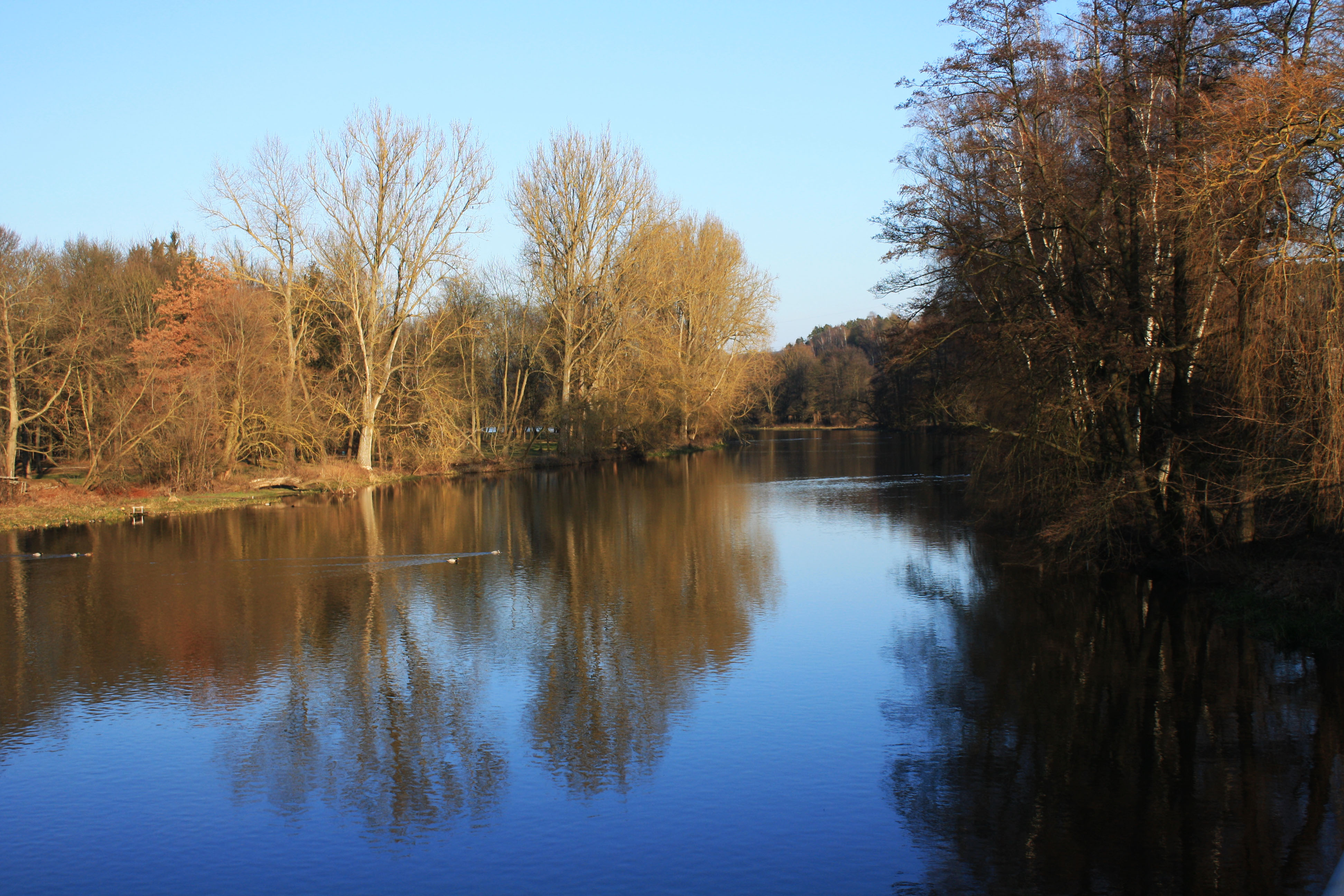 Flusslauf der Naab zwischen Schwarzachmündung und dem Schwarzenfelder Naabwehr